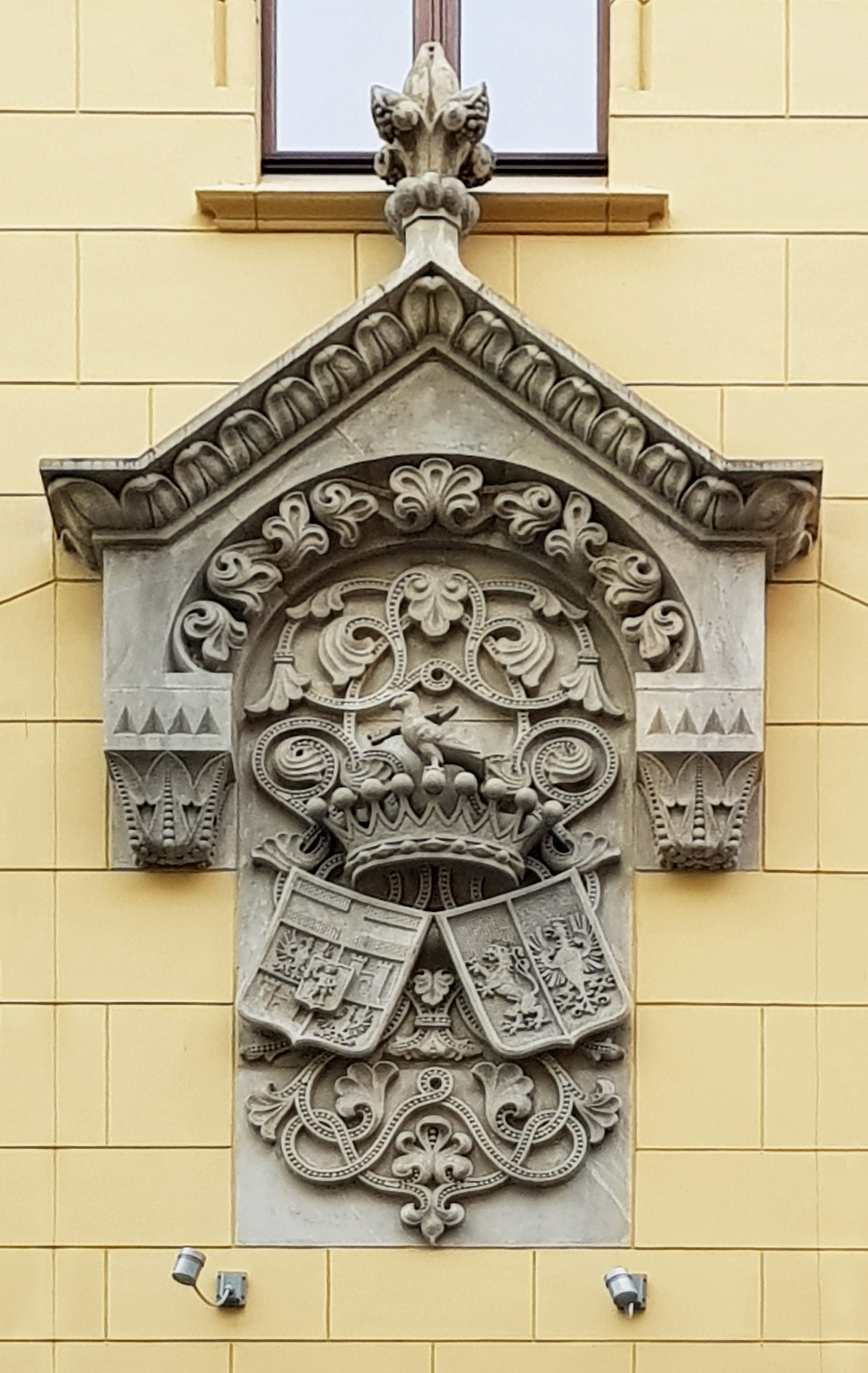 Herb hrabiego von Ballestrema na pałacu Ballestremów we Wrocławiu